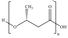 Trabalho sobre descrição de estudos sobre o polímero biodegradável PHB